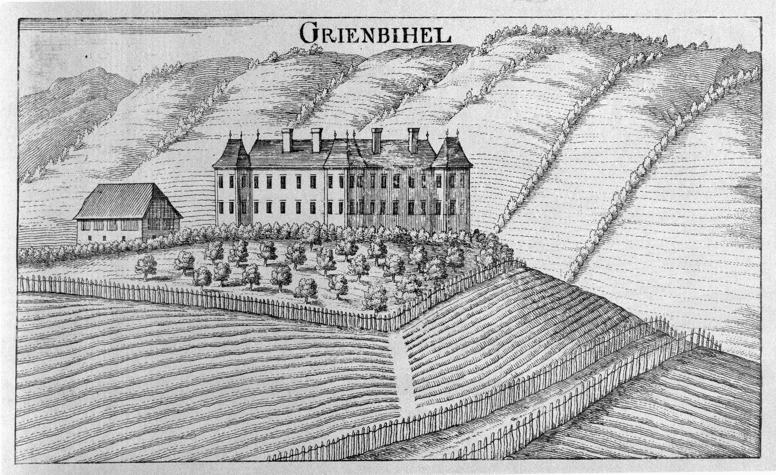 G. M. Vischers Käyserlichen Geographi, Topographia Ducatus Stiriae, Das ist: Eigentliche Delineation / und Abbildung aller Städte / Schlösser / Marcktfleck / Lustgärten / Probsteyen / Stiffter / Clöster und Kirchen / so es sich im Herzogthumb Steyrmarck befinden; Und anjetzo Umb einen billichen Preyß zu finden seynd Bey Johann Bitsch Universitäts Buchhandlern / Auff dem Juden=Platz bey der guldenen Saulen. Graz 1681 Die Nummerierung der Dateien folgt der alphabetischen Reihung der Ortsnamen